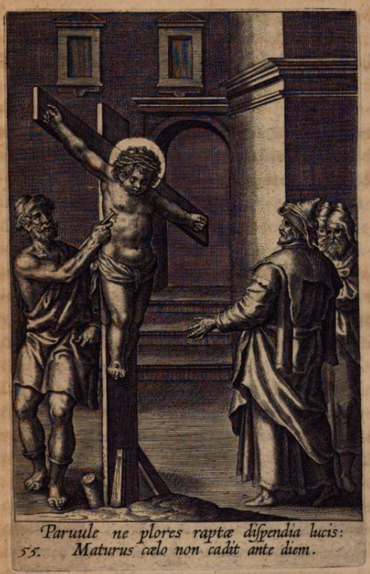 Pedro de Bivero: Sacrum sanctuarium crucis et patientiae crucifixorum et cruciferorum, emblematicis imaginibus laborantium et aegrotantium ornatum..., Amberes, Baltasar Moreto, 1634. Hugo de Lincoln. Ejemplar de la Universidad Complutense de Madrid.